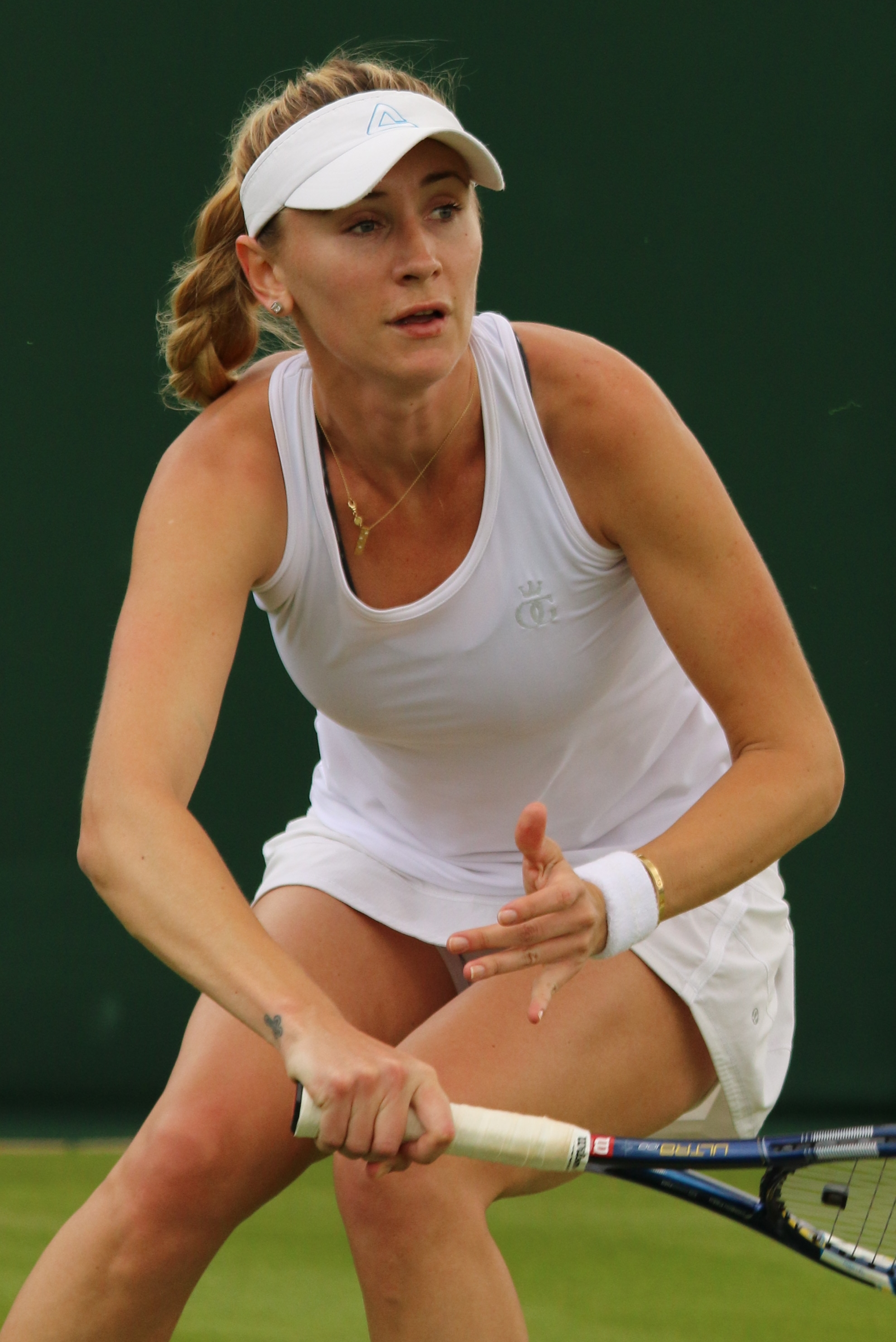 Govortsova WM16 (10)